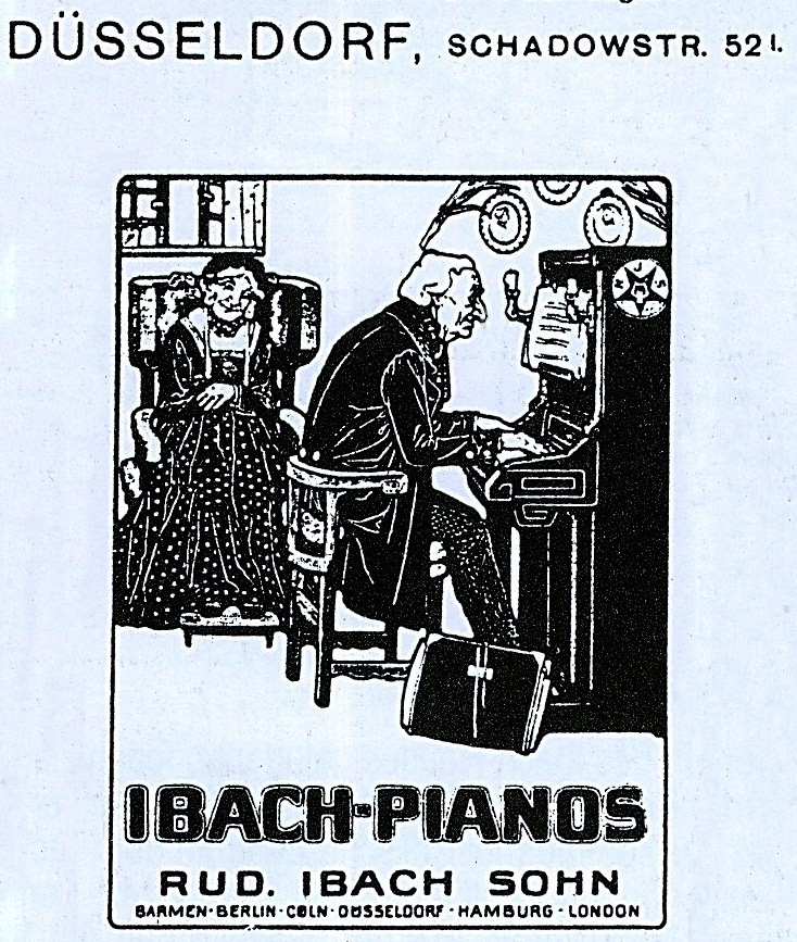 g